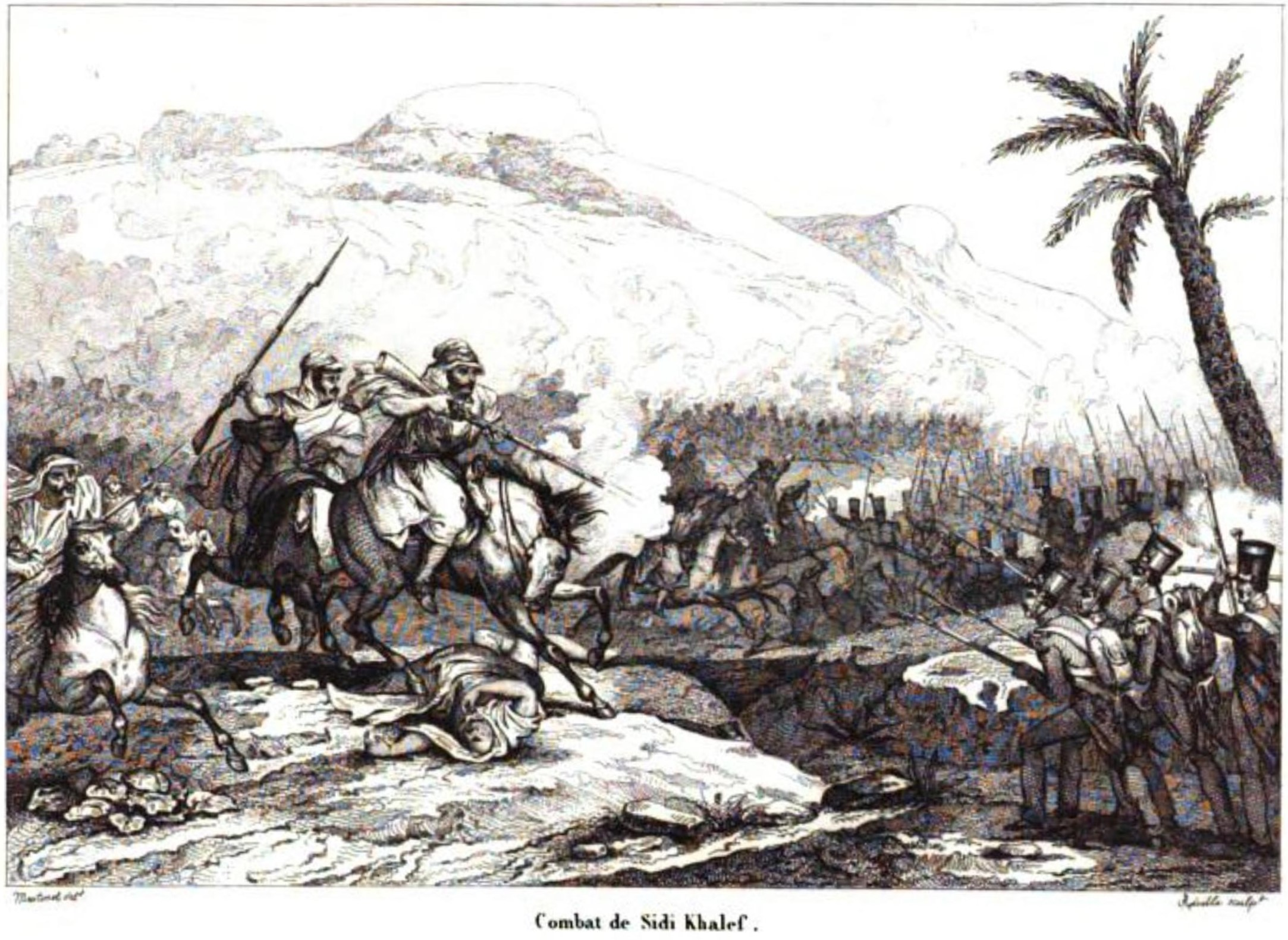 Gravure ancienne: "France militaire. Combat de Sidi Khalef." 1830.